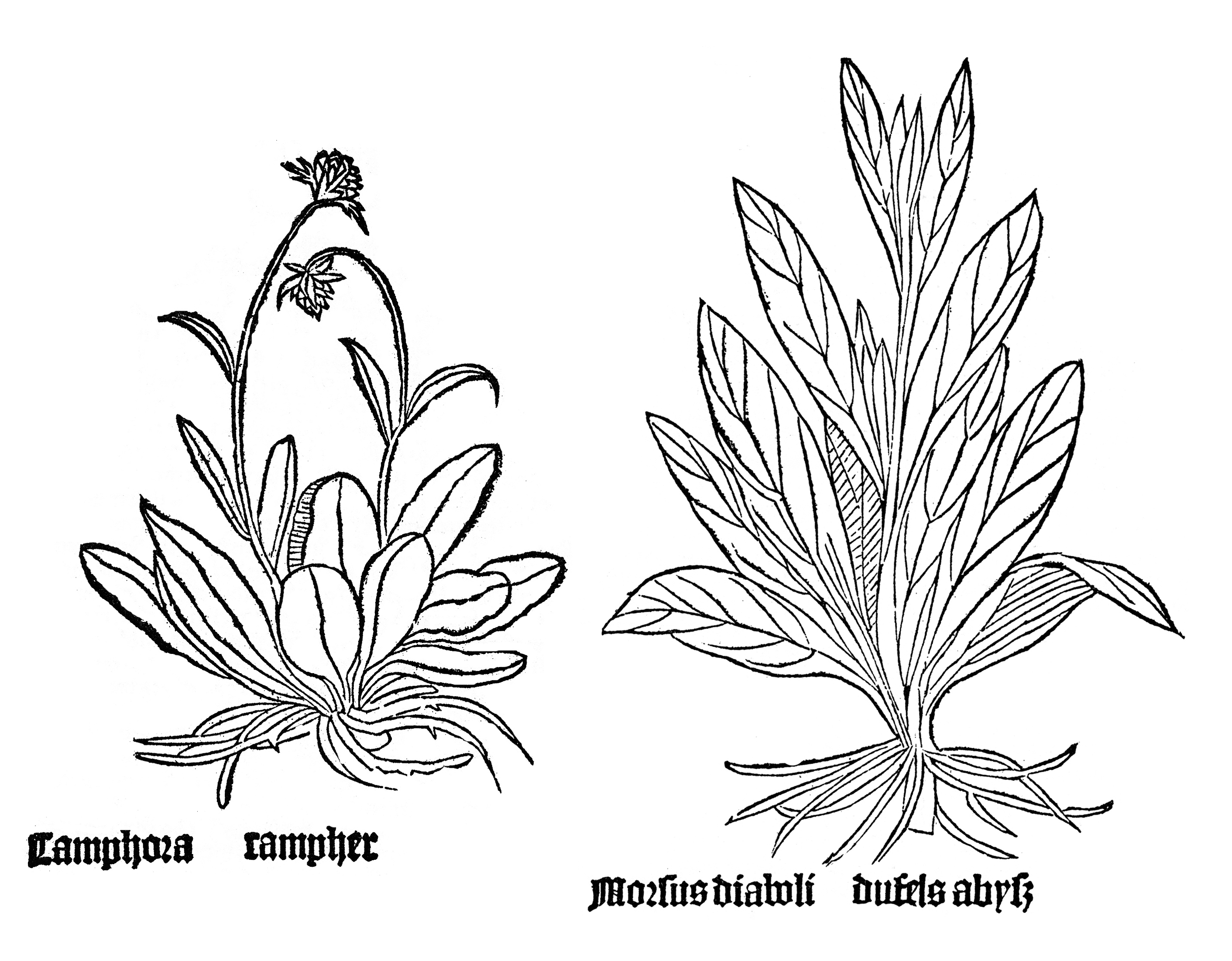 Abbildung von Succisa pratensis